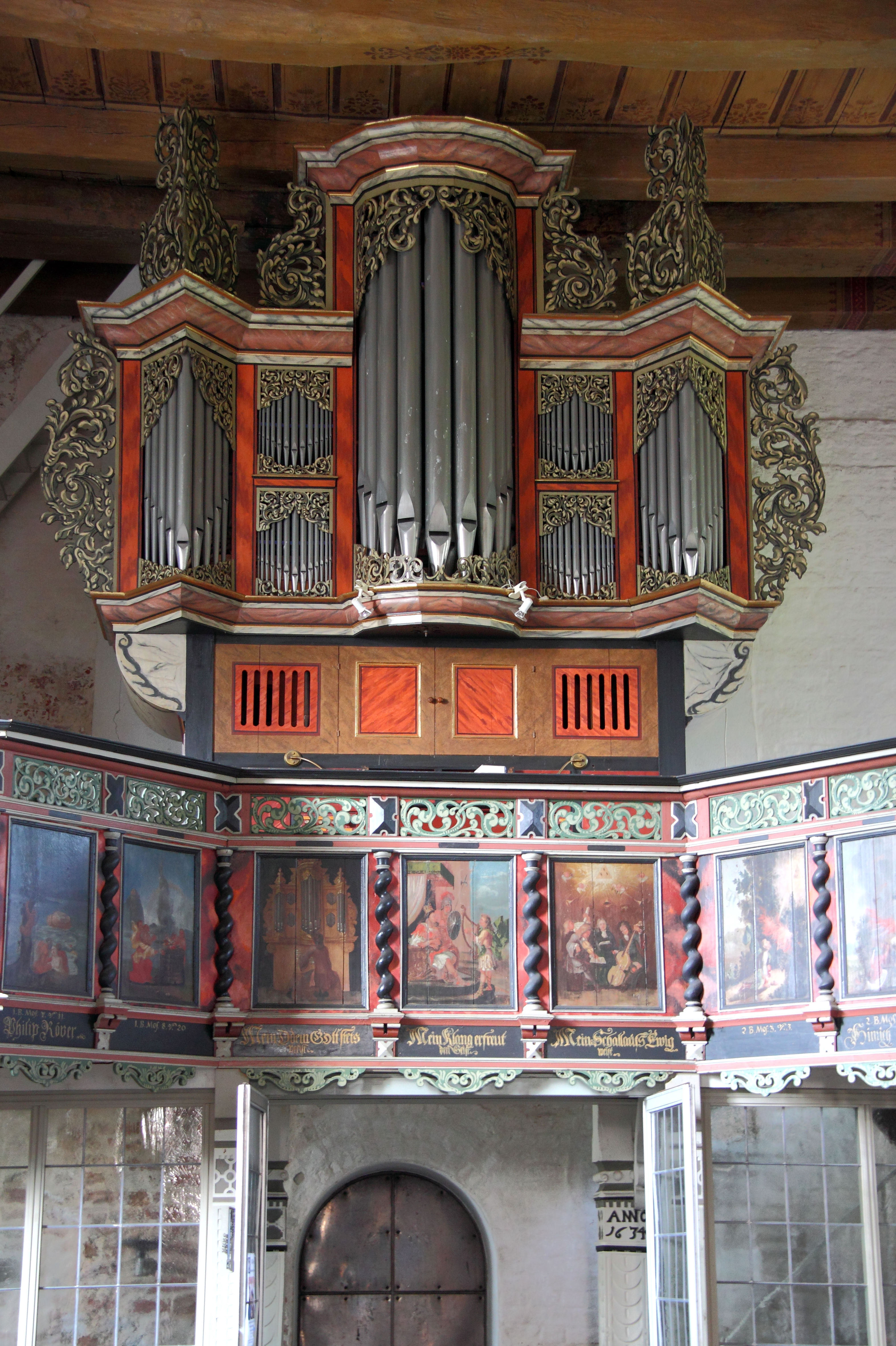 Orgel in Golzwarden